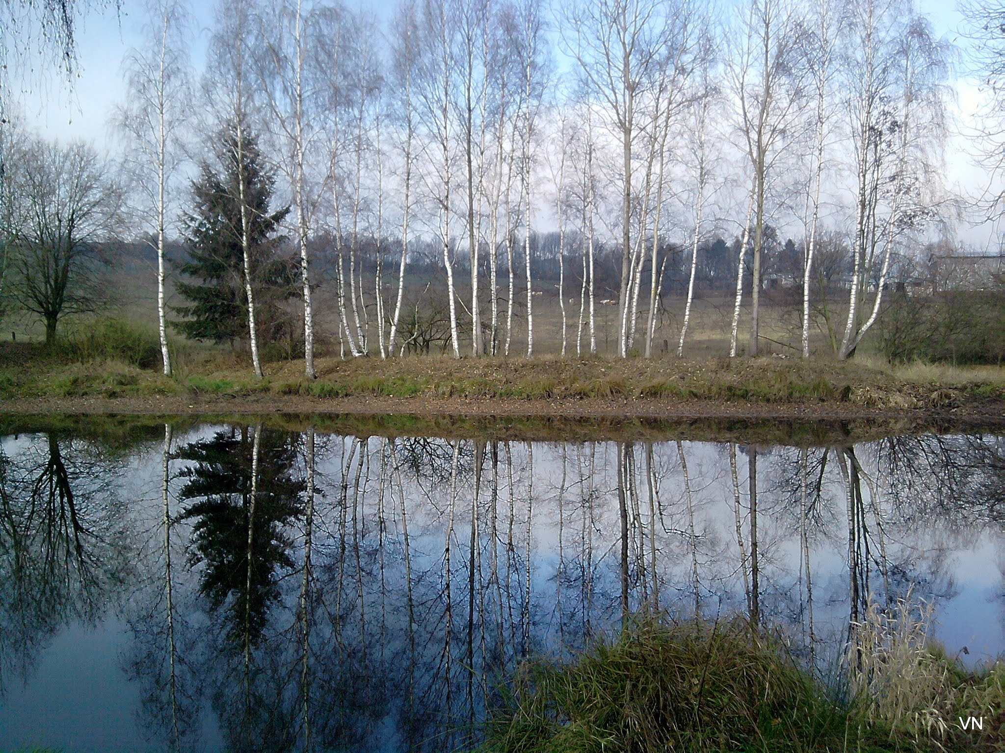 348 15 Zadní Chodov, Czech Republic